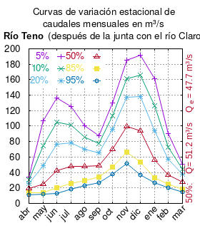 Curvas de variación estacional del río Teno después de la junta con el río Claro. # Dirección General de Aguas # Diagnóstico y clasificación de los cursos y cuerpos de agua según objetivos de calidad. Cuenca del río Mataquito # Santiago de Chile # Ministerio de Obras Públicas (Chile) # 2004 # url: # urlarchivo: # Tabla 4.2: Río Teno después junta con Claro (m3/s) pág. 39 mes 5% 10% 20% 50% 85% 95% abr 34.501 30.417 26.158 19.726 14.013 11.420 may 106.990 74.368 49.053 24.755 14.061 11.641 jun 136.097 104.950 76.607 41.974 20.006 12.945 jul 125.109 101.079 78.067 47.647 25.937 18.146 ago 100.685 85.425 70.004 47.850 29.946 22.740 sep 87.913 77.112 65.852 48.845 33.738 26.883 oct 129.827 113.199 95.883 69.814 47.230 37.542 nov 185.360 161.621 136.873 99.493 66.288 51.221 dic 191.317 165.968 138.241 93.905 53.878 37.015 ene 161.615 125.851 93.969 56.217 33.377 26.357 feb 90.057 72.684 56.788 37.195 24.606 20.511 mar 50.707 44.222 37.468 27.295 18.477 14.693 This plot was created with Gnuplot.